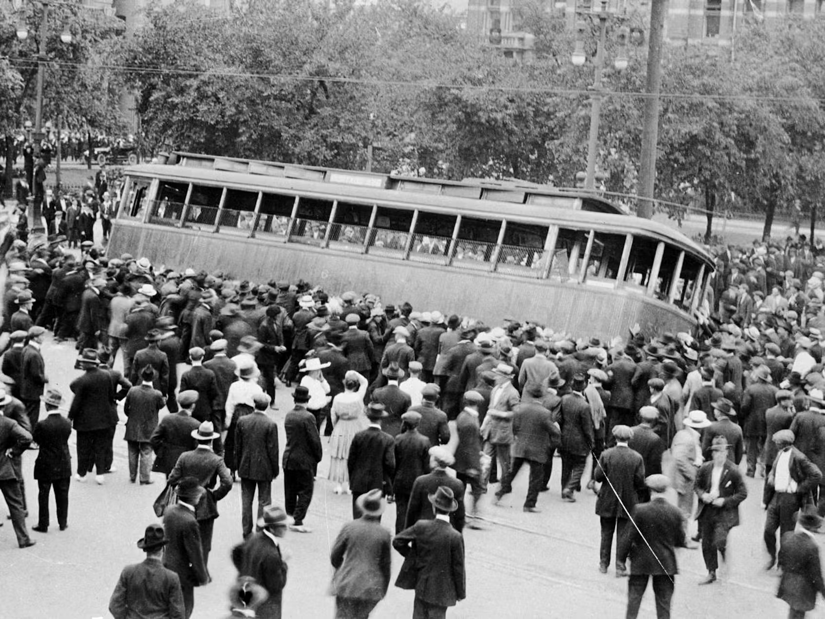 Image de la grève générale de Winnipeg de 1919.